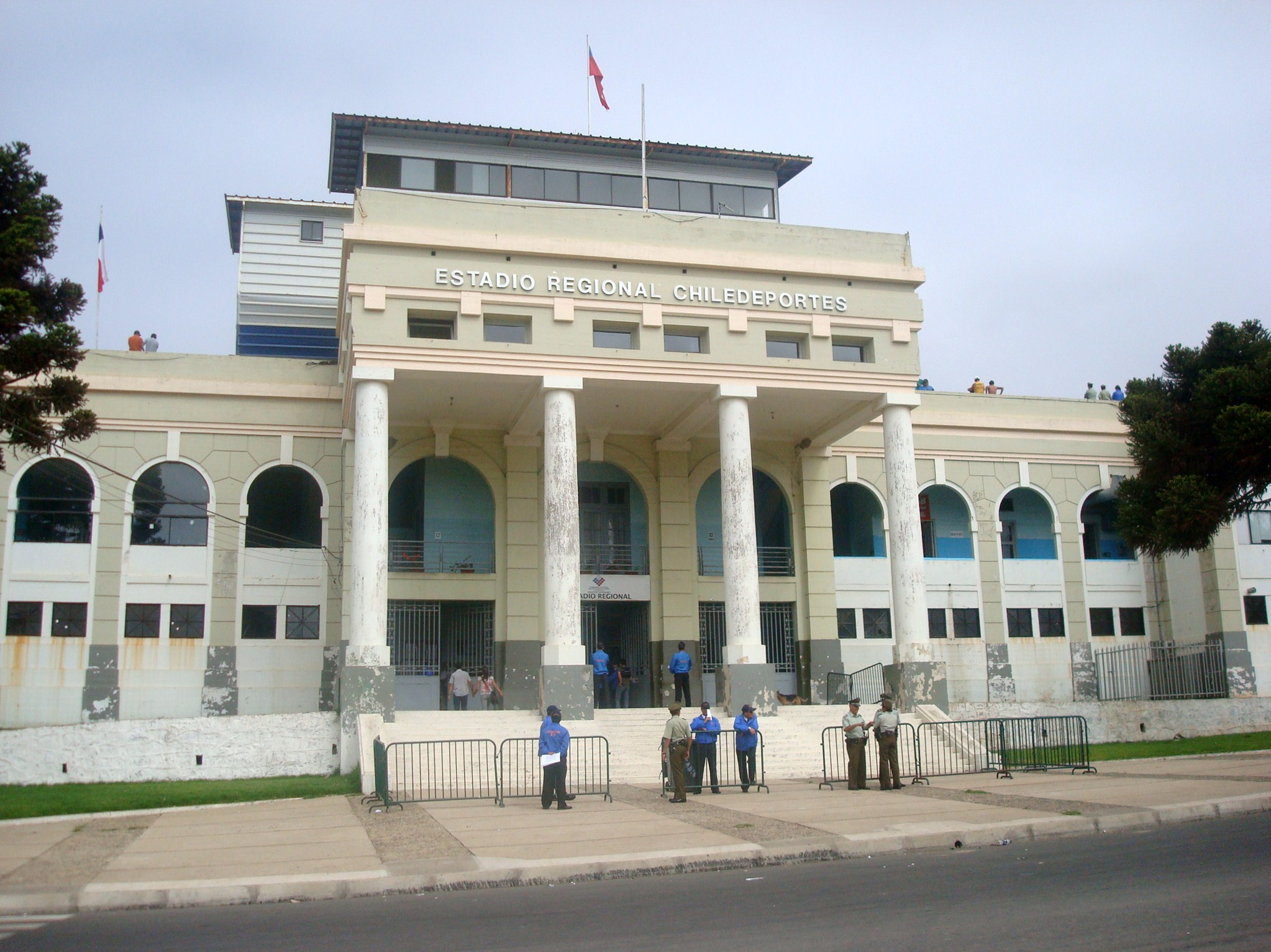 Estadio Regional Chiledeportes, Playa Ancha, Valparaiso